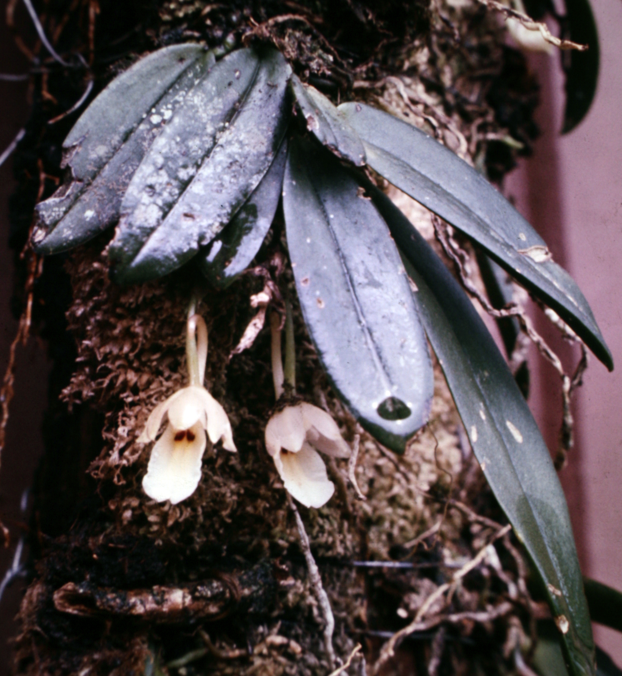 Trichocentrum fuscum , Suriname.